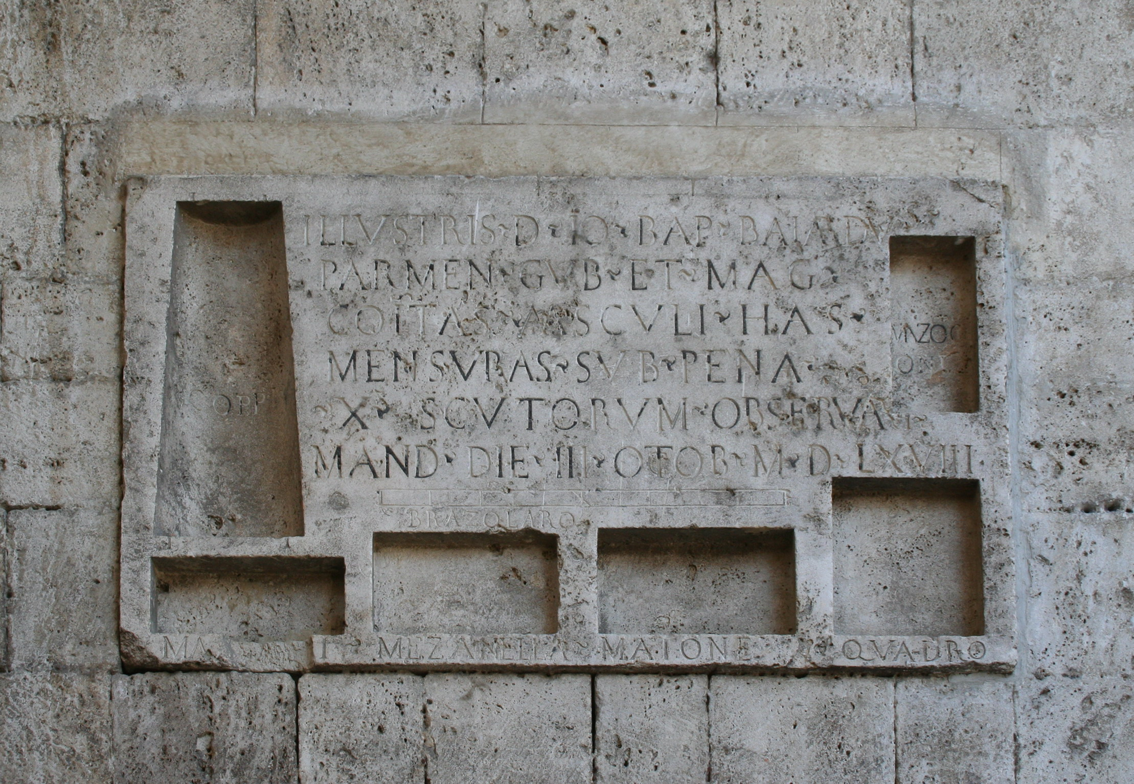 Misure convenzionali stabilite per i laterizi ascolani nel 1568, Loggia dei Mercanti di Ascoli Piceno.